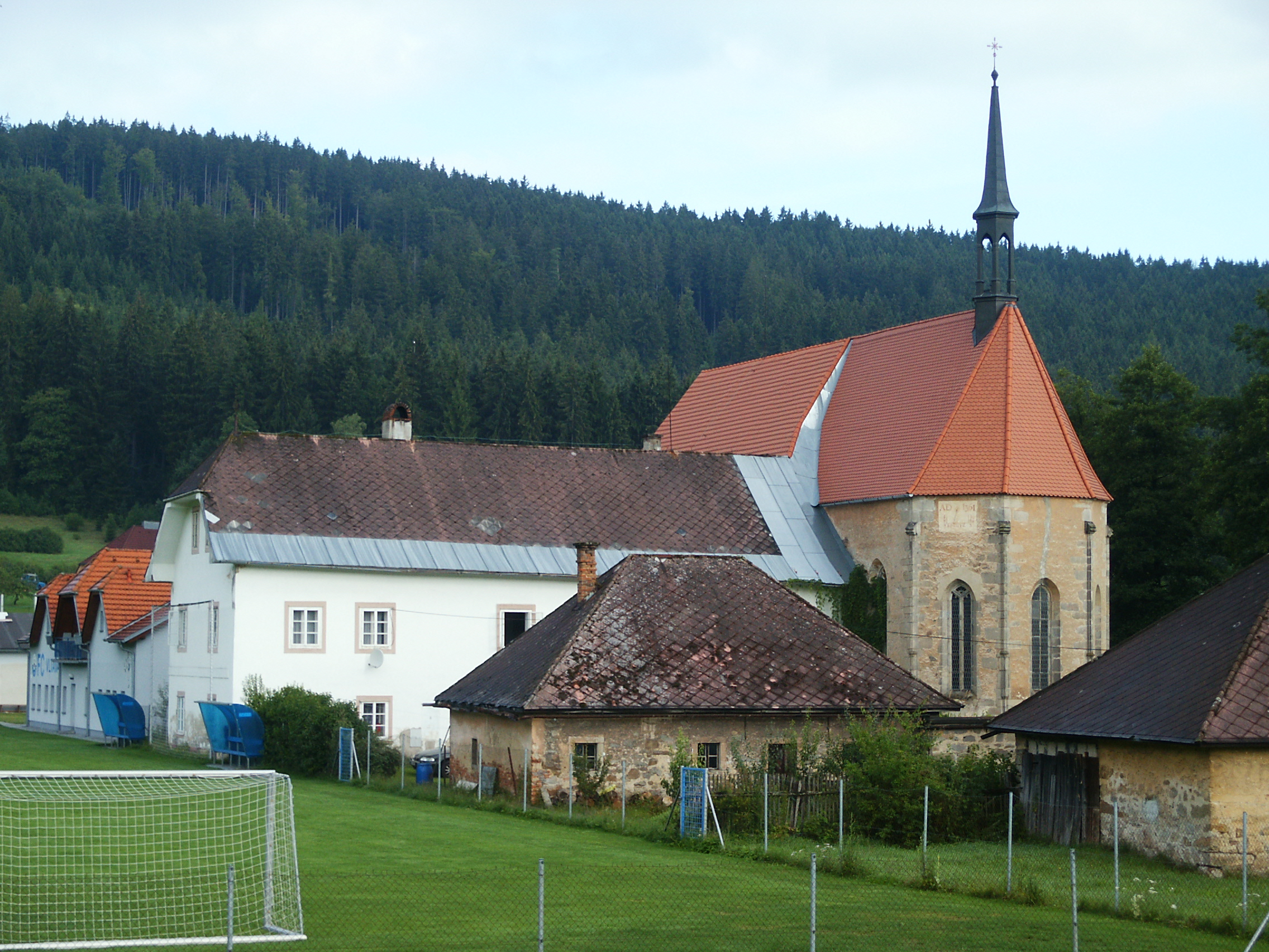 Kostel svatého Oldřicha, na břehu Vltavy, proti kapli sv. Prokopa, Loučovice - celkový pohled s farou.